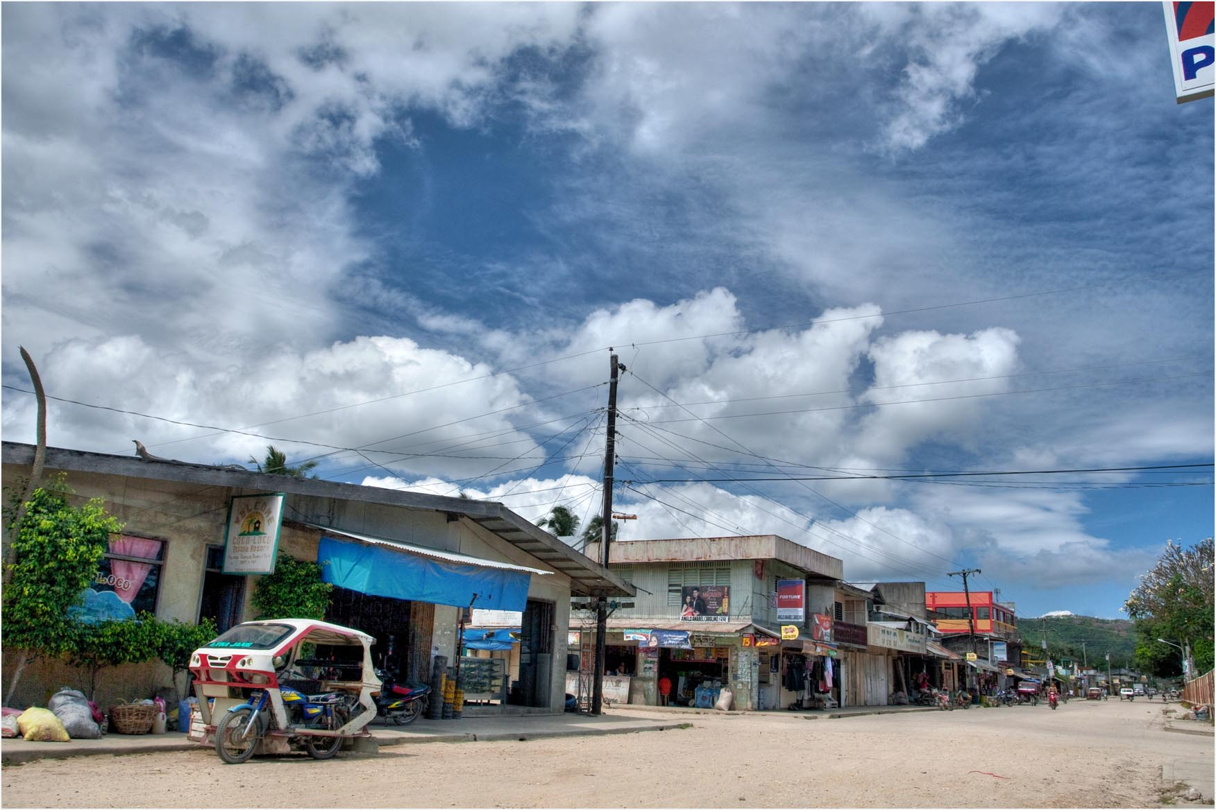 Roxas Palawan